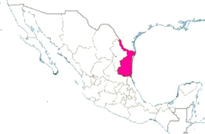 Estado de Tamaulipas, México